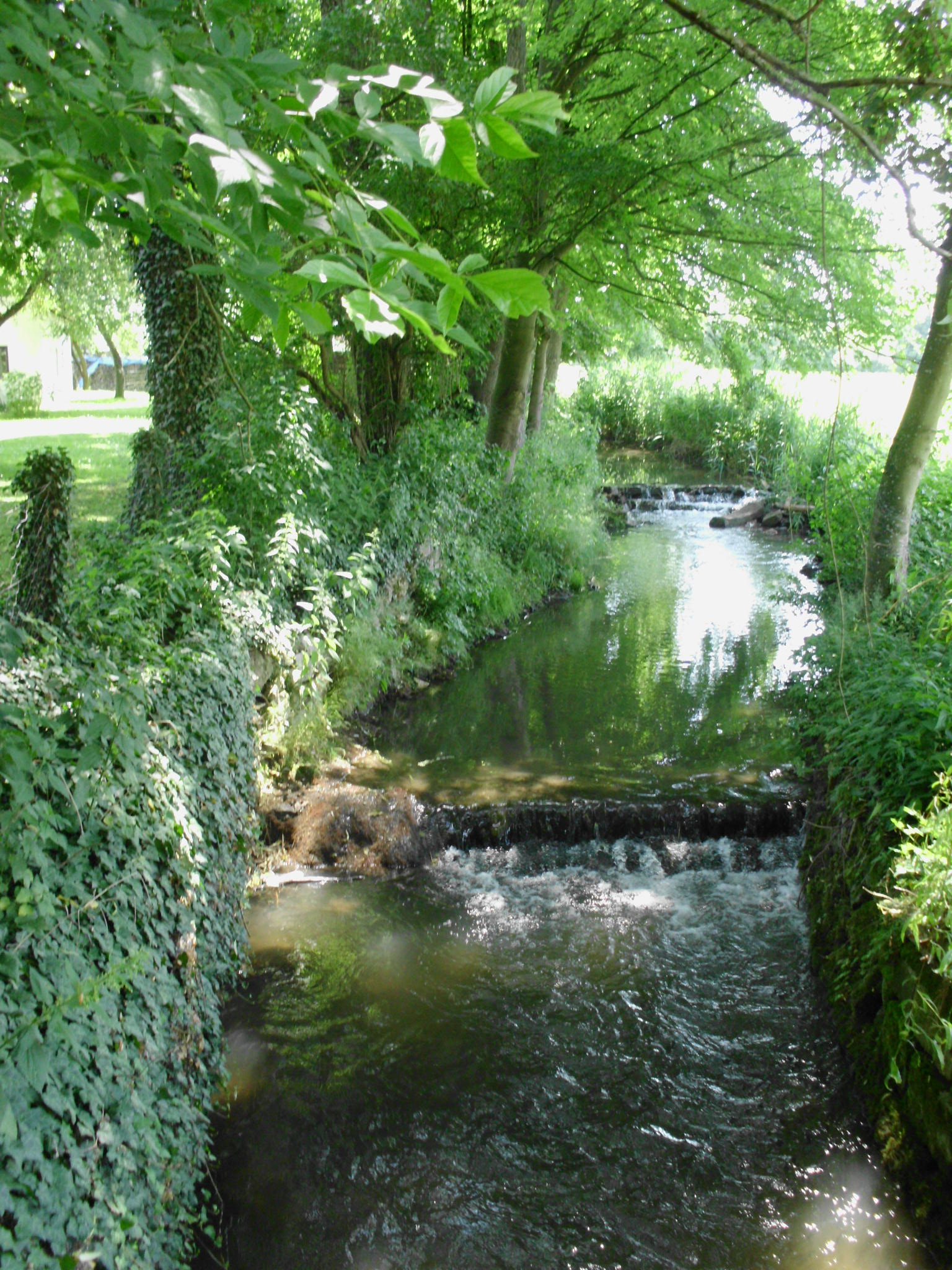 Bach an der Kästleinsmühle, Ortsteil von Treuchtlingen im Landkreis Weißenburg-Gunzenhausen